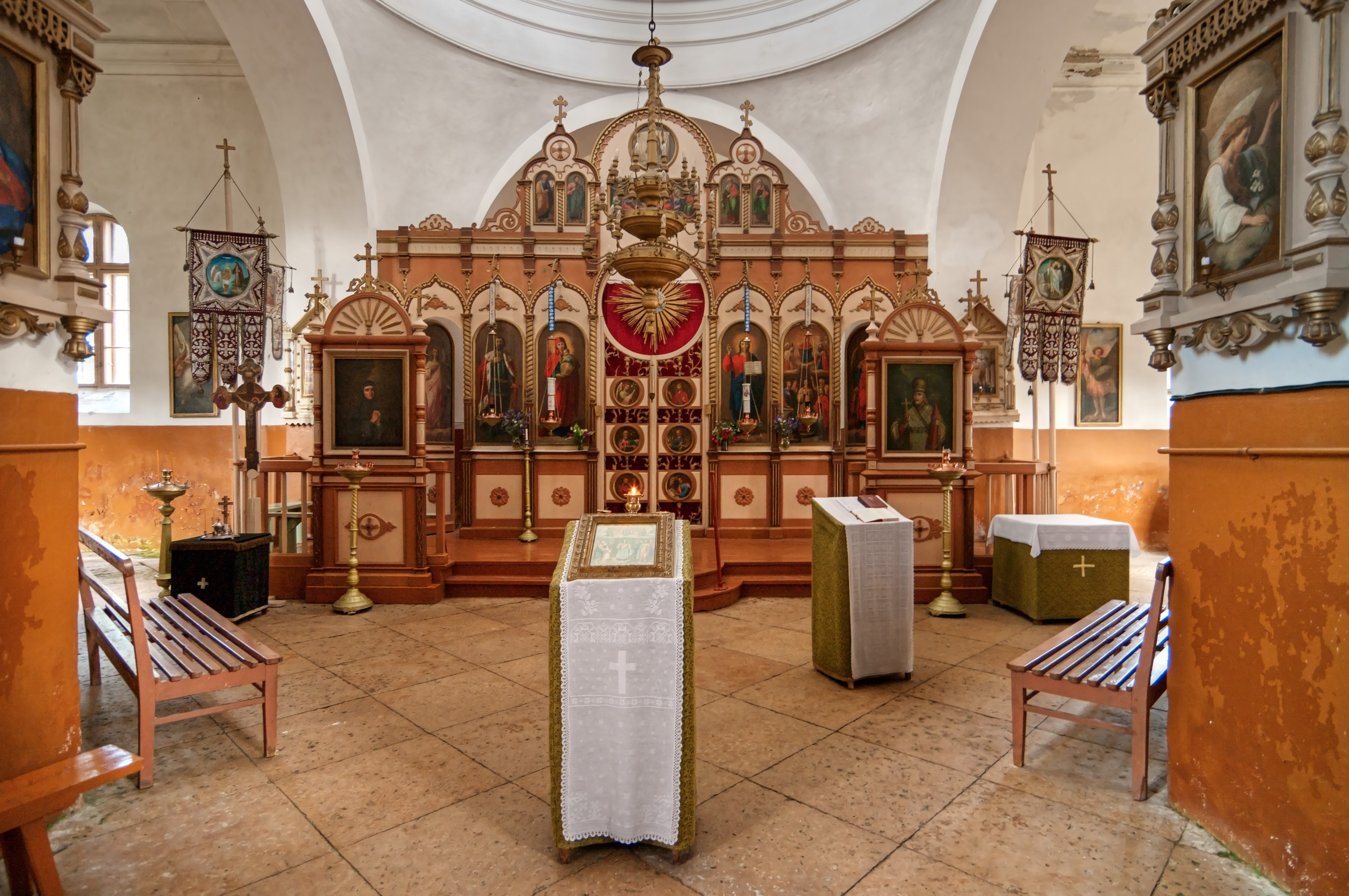 Tornimäe Neitsi Maarja Kaitsmise kirik Saaremaal. Sisevaade.